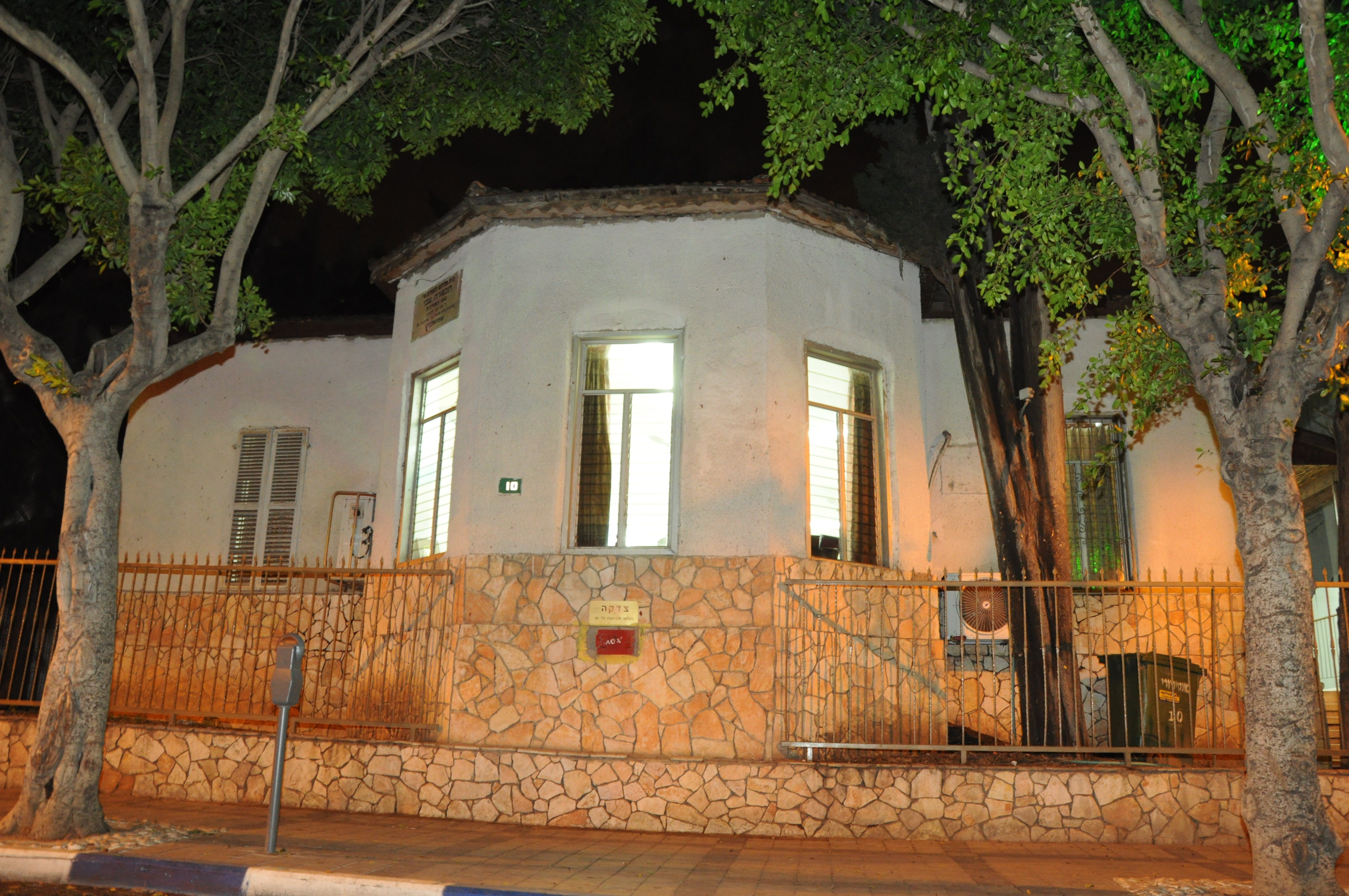 בית מדרש לתורת ארץ ישראל מונטיפיורי 10 פתח תקווה